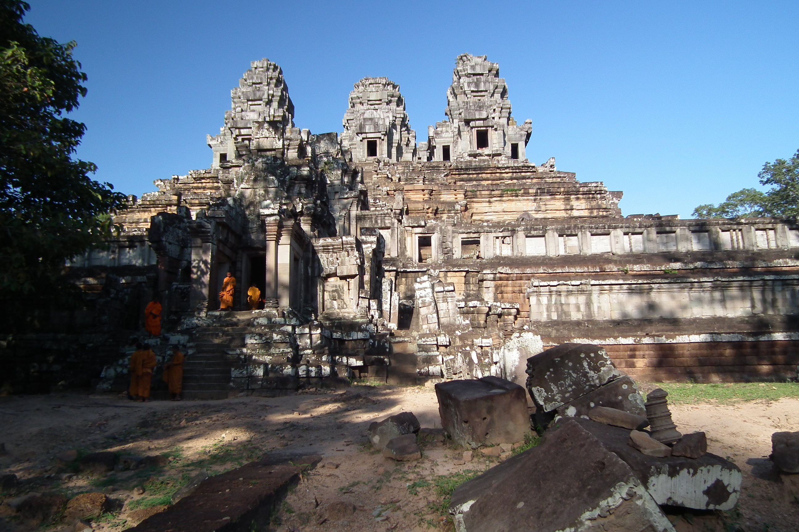 Ta Keo (Khmer ប្រាសាទតាកែវ) Angkor Cambodia タ・ケウ Photo:Akiyoshi Matsuoka